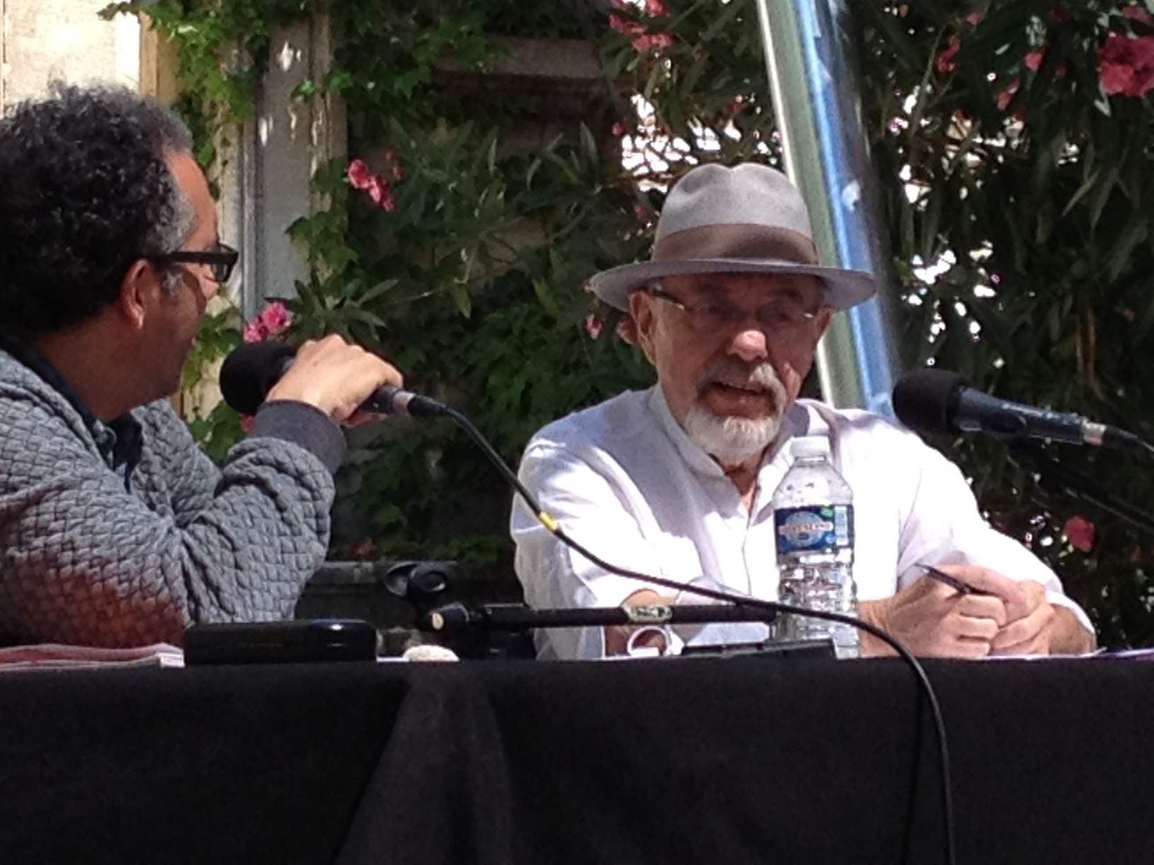 Débat autour de Delta Charlie Delta au Festival d'Avignon 2016